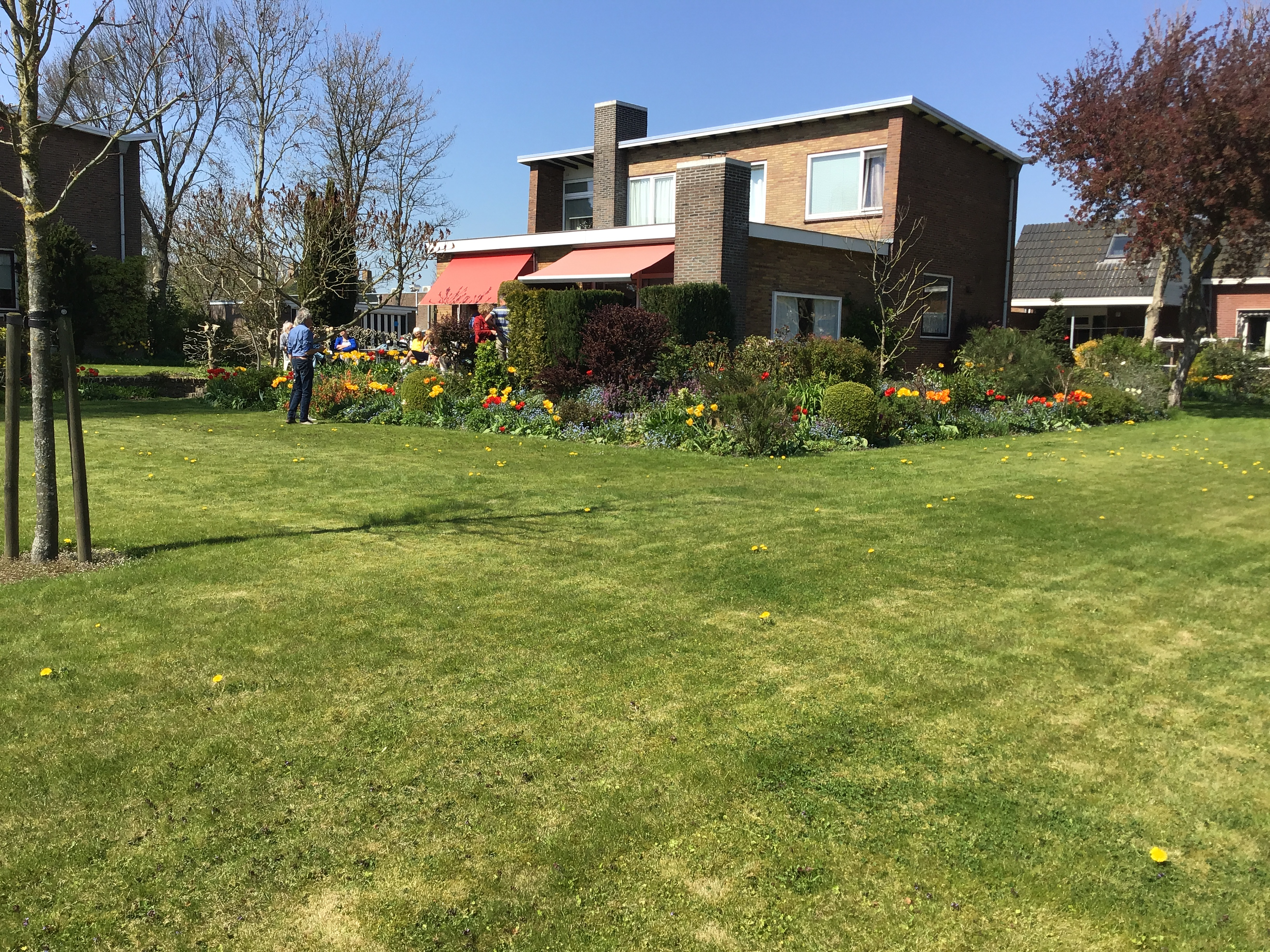 Ontwerp woning D.A.Emaar 1959